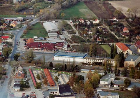 Szigetszentmiklós, Hungary, aerialphotography